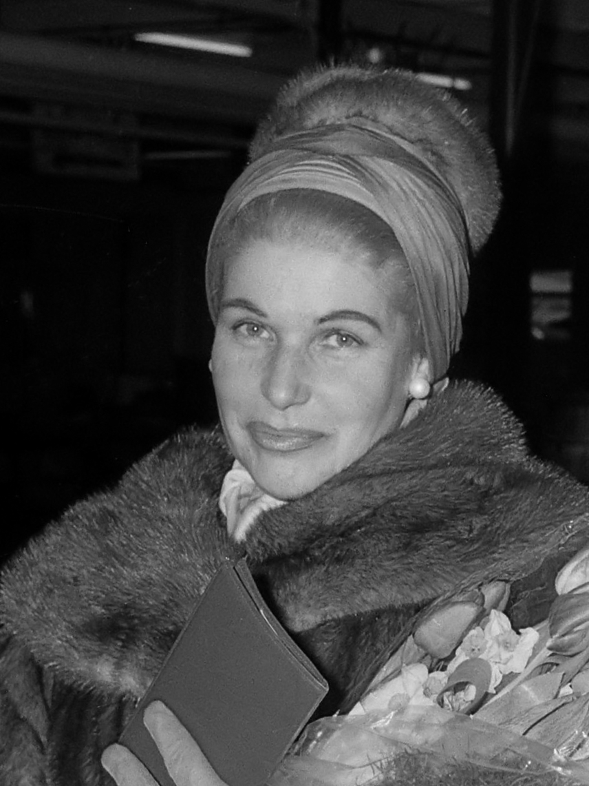 Operazangeres Hilde Gueden in ons land 1 maart 1962